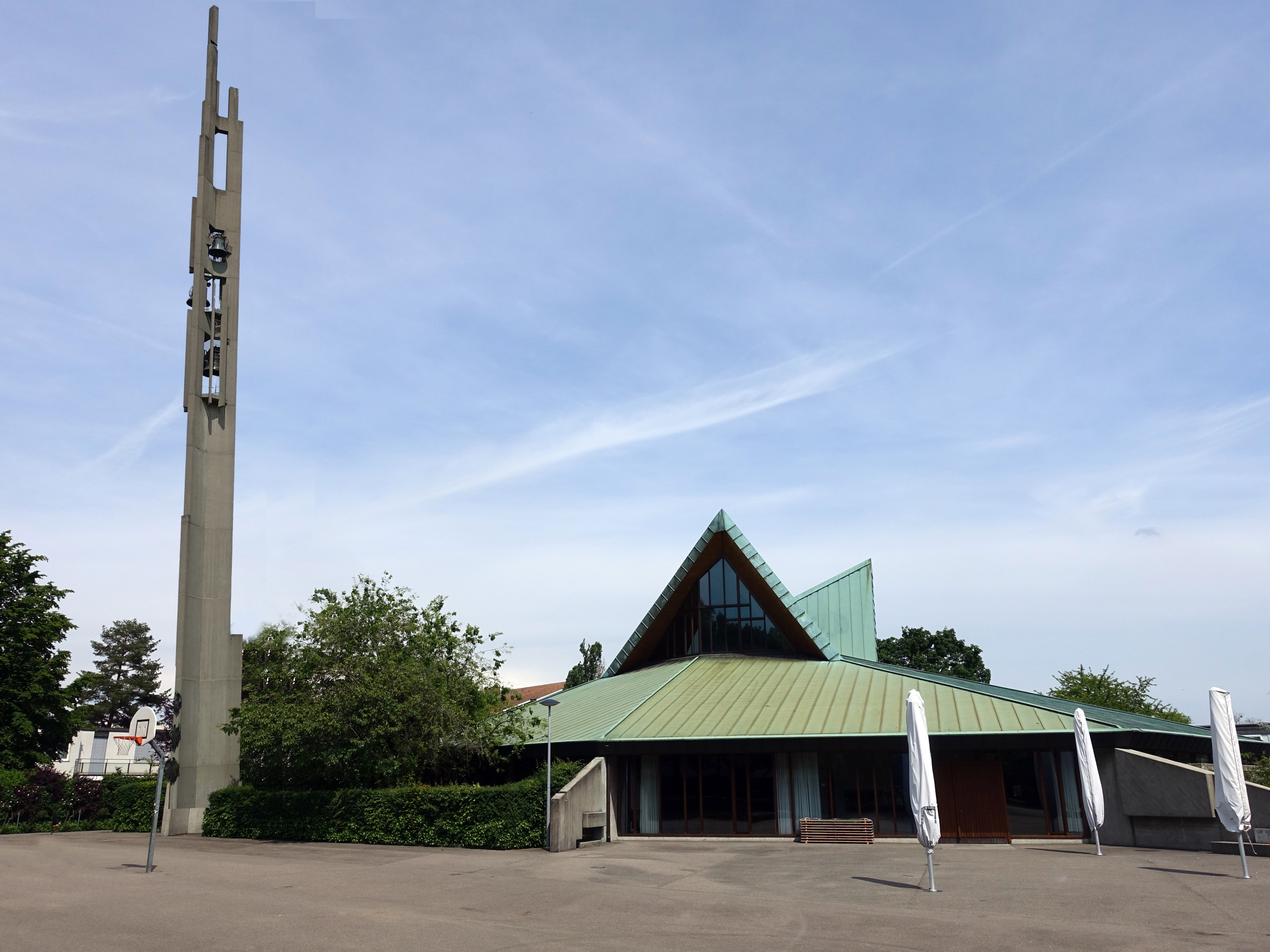 Die Gellertkirche wurde von Architekten Curt P. Blumer geplant und am 08 Nov. 1964 eingeweiht. Der Glockenträger erinnert an eine Hand, die in den Himmel zeigt. Am untersten Teil einer Turmrippe sind drei Bronze-Engelfiguren, geschaffen vom Hans Geissberger (1921–1999) Bildhauer und Maler, angebracht. Sie stehen in einem äusseren Zusammenhang mit dem Geläute, denn in verkleinerter Form zieren sie den Mantel der drei Glocken selbst, deren Ton sie durch ihre Bewegung herunter auf die Erde bringen wollen. Darum greift der oberste Engel mit erhobenen Armen nach oben, um symbolisch den Klang zu erfassen, der mittlere Engel hält ihn tragend fest, und der unterste führt ihn hinab auf die Erde, Die drei Glocken sind auf Ges, As und hochgestrichenes Ces gestimmt. Beim Läuten erfährt der Turm eine Schwankung von maximal 2.5 cm in elliptischer Form.